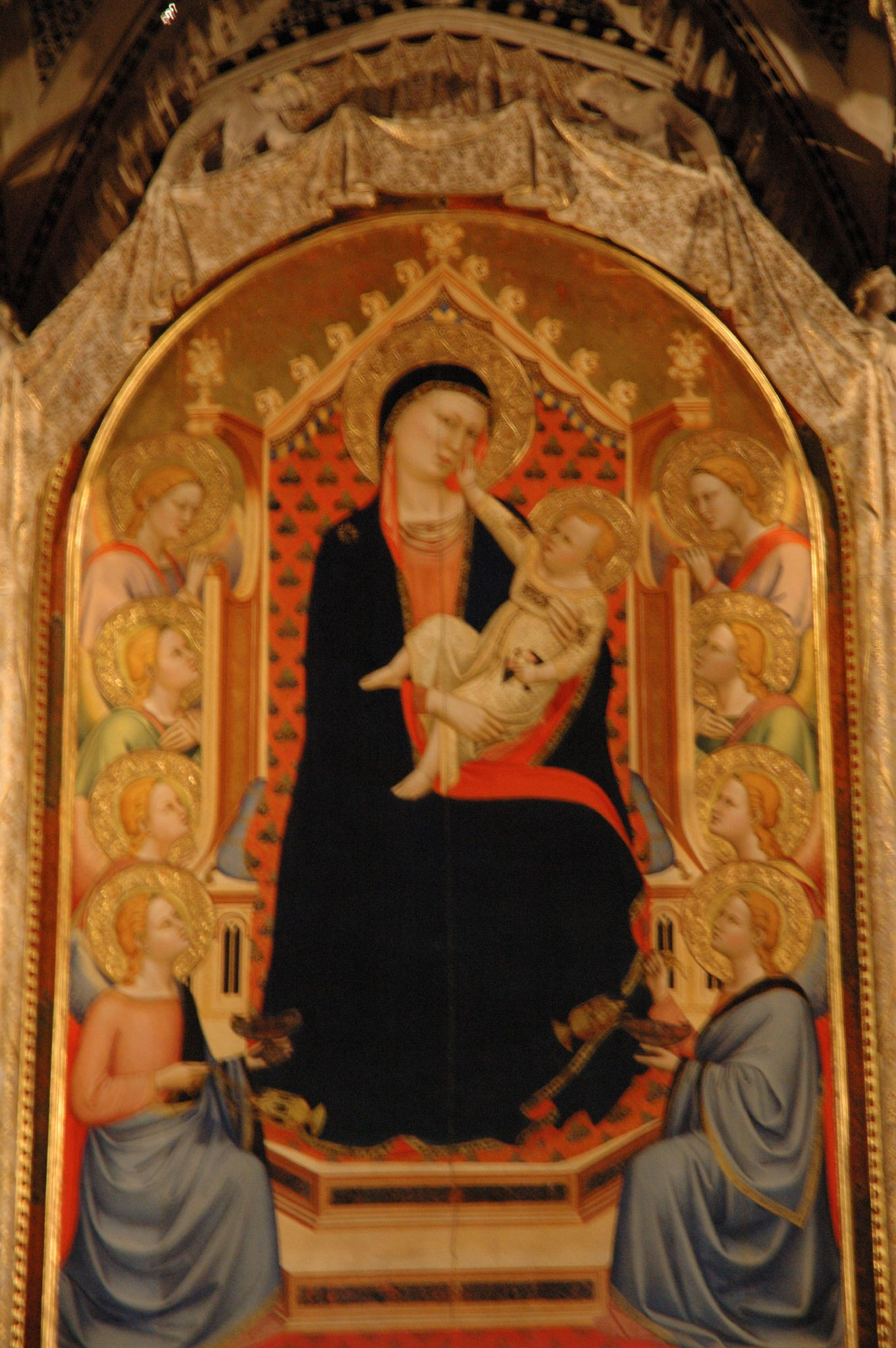 Pisa, Toscana, ItaliaOrsanmichele: Madonna delle Grazie